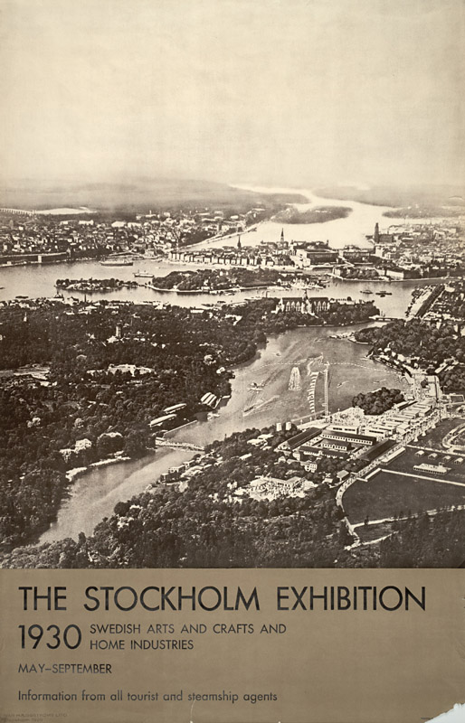 Stockholmsutställningen 1930